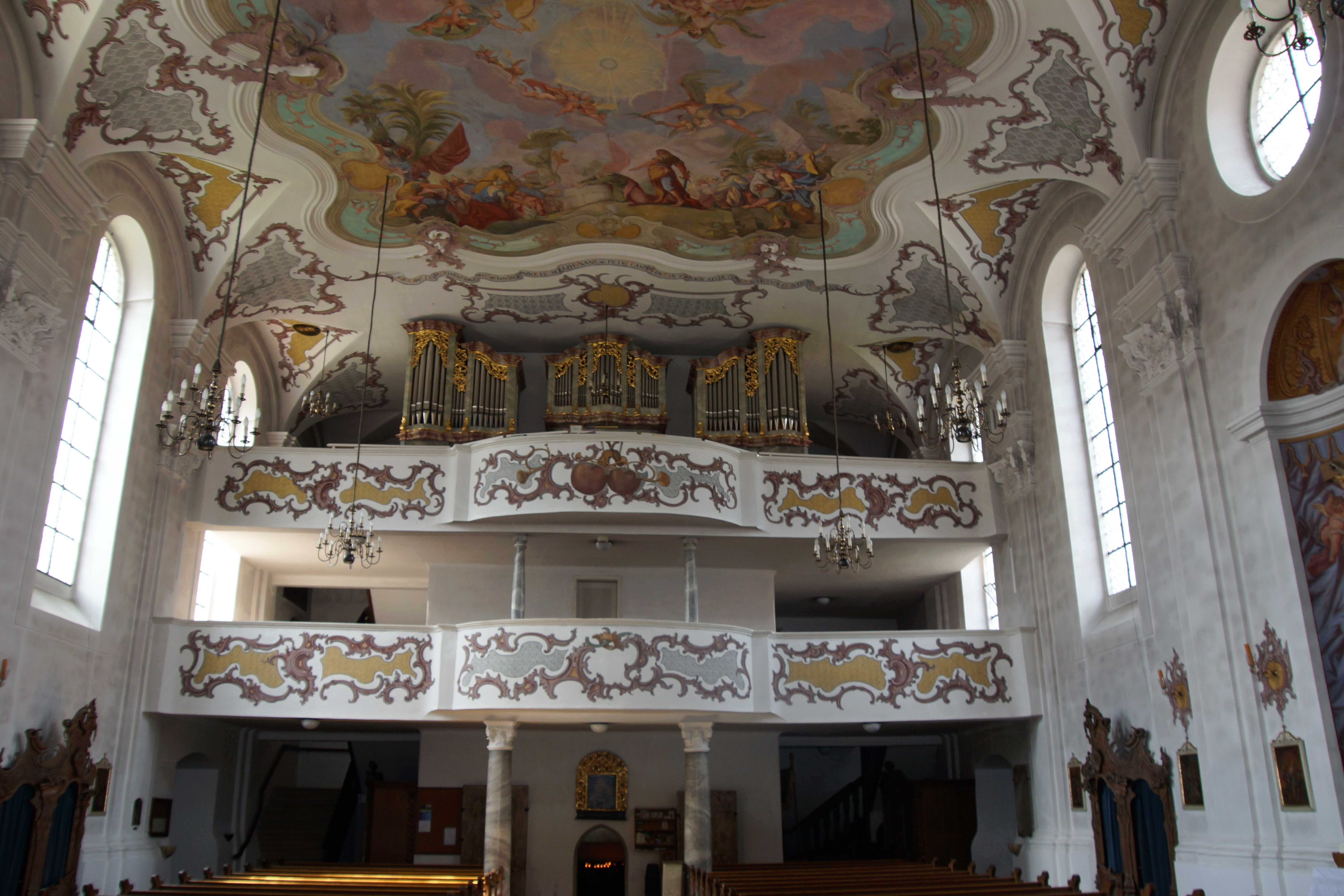 Die katholische Pfarrkirche St. Peter und Paul in Beratzhausen